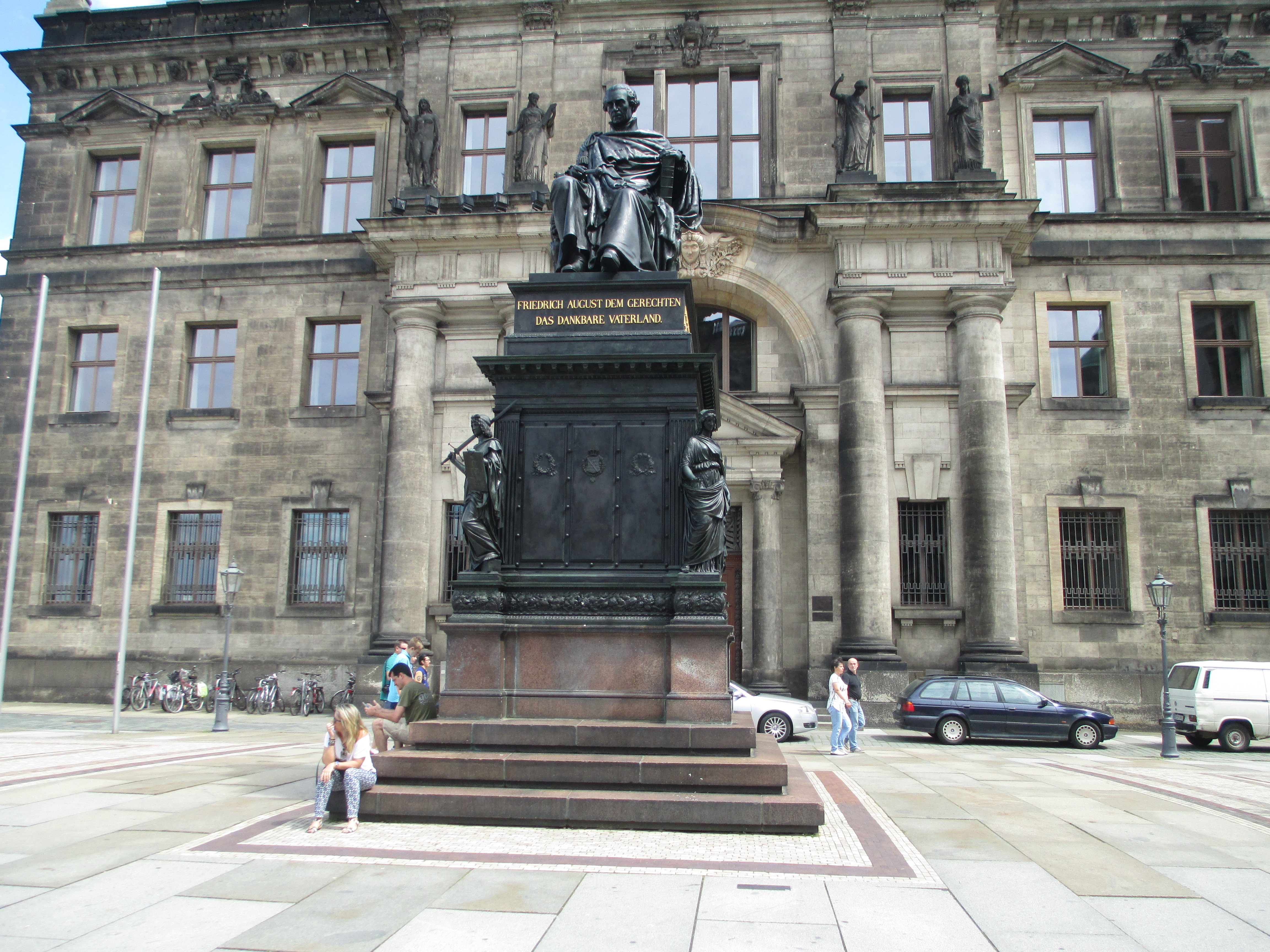 פסל של פרדריק אוגוסטוס השני בדרזדן